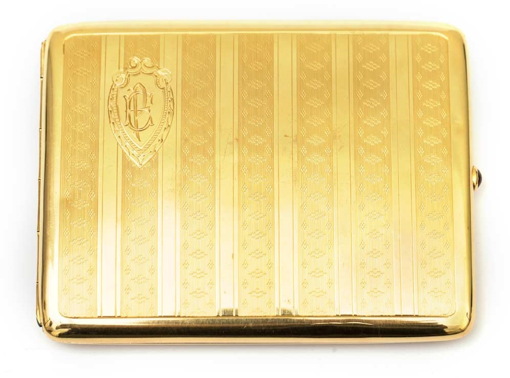 Cigarreira